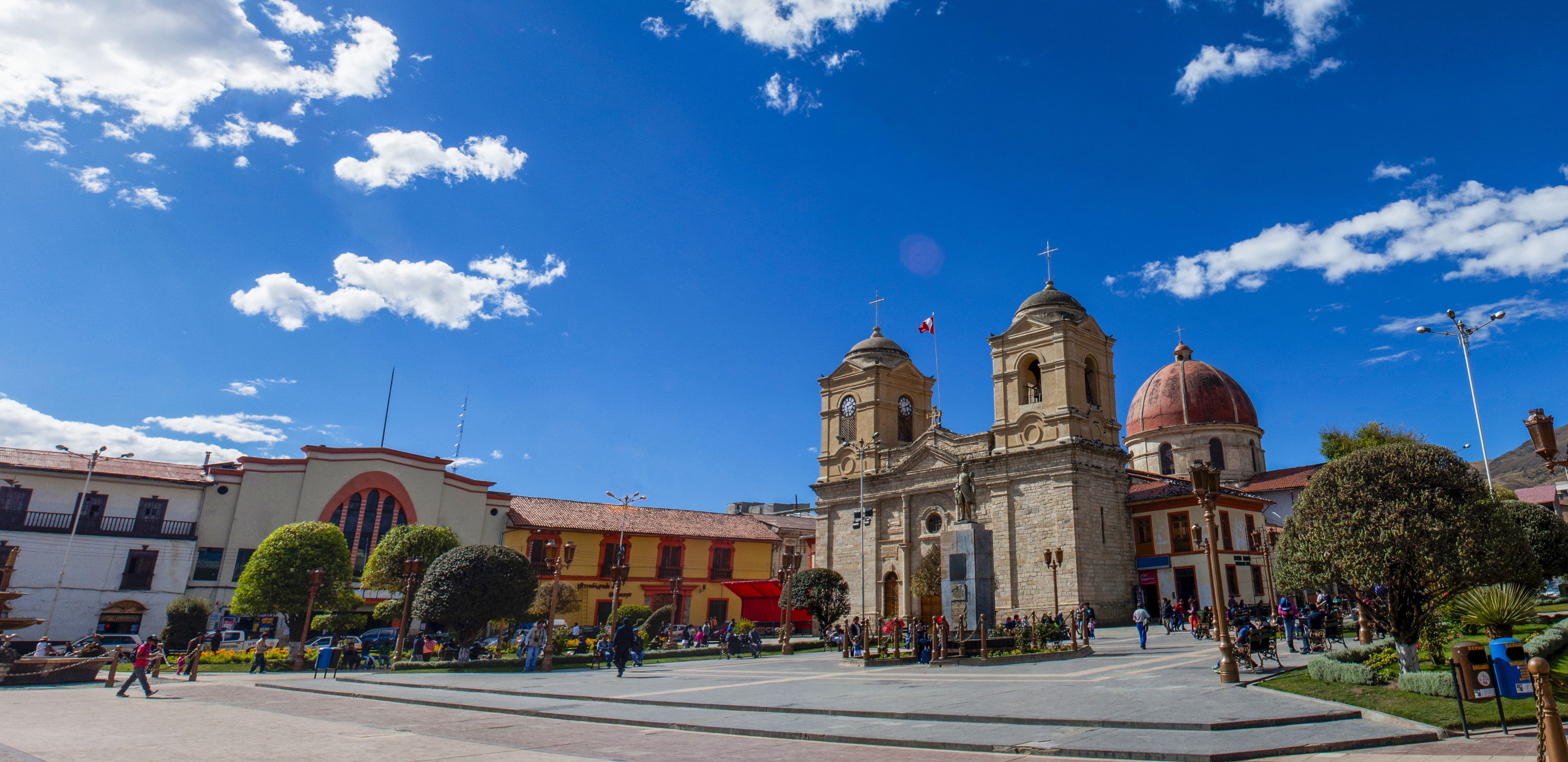 La iglesia más importante de la ciudad de Huancayo.